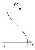 Graf funkce arkus kosinus.